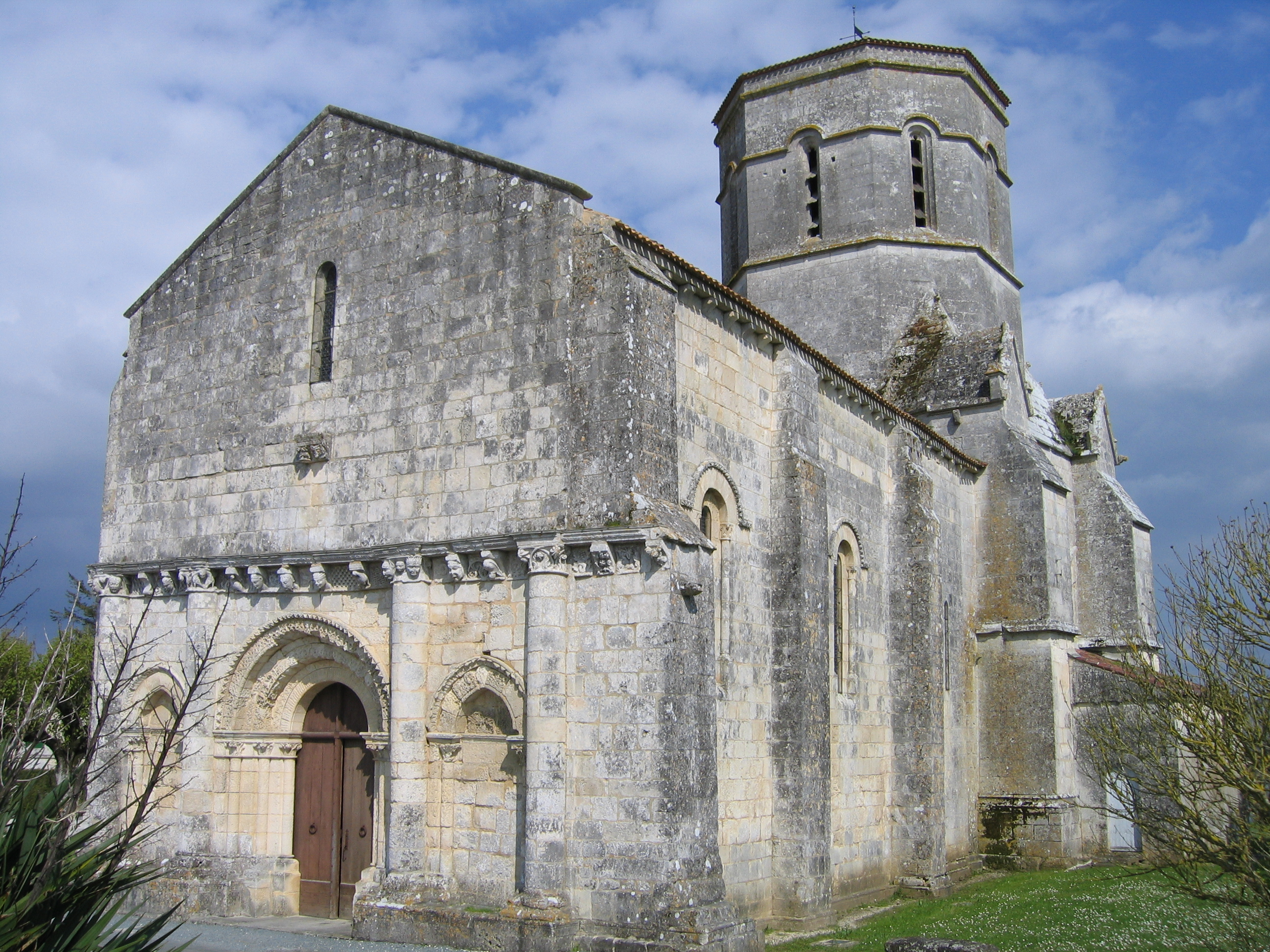 L'église romane de Rétaud